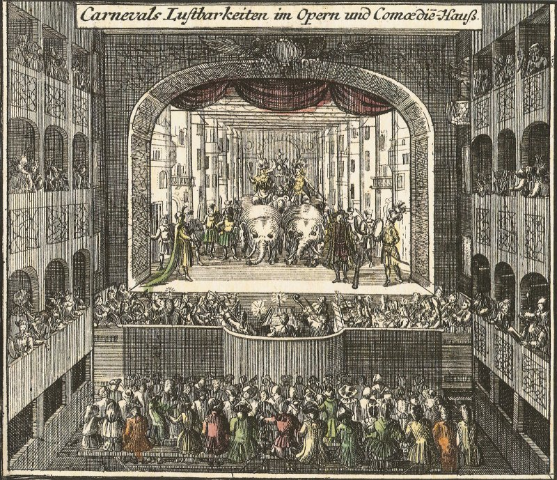 Markgrafentheater in Erlangen. Randbild aus dem Plan des Schlossgartens von Johann Baptist Homann.